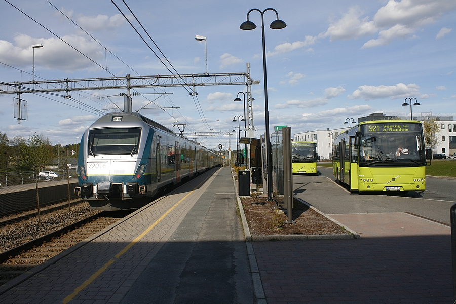 Tog og busser på Vestby stasjon